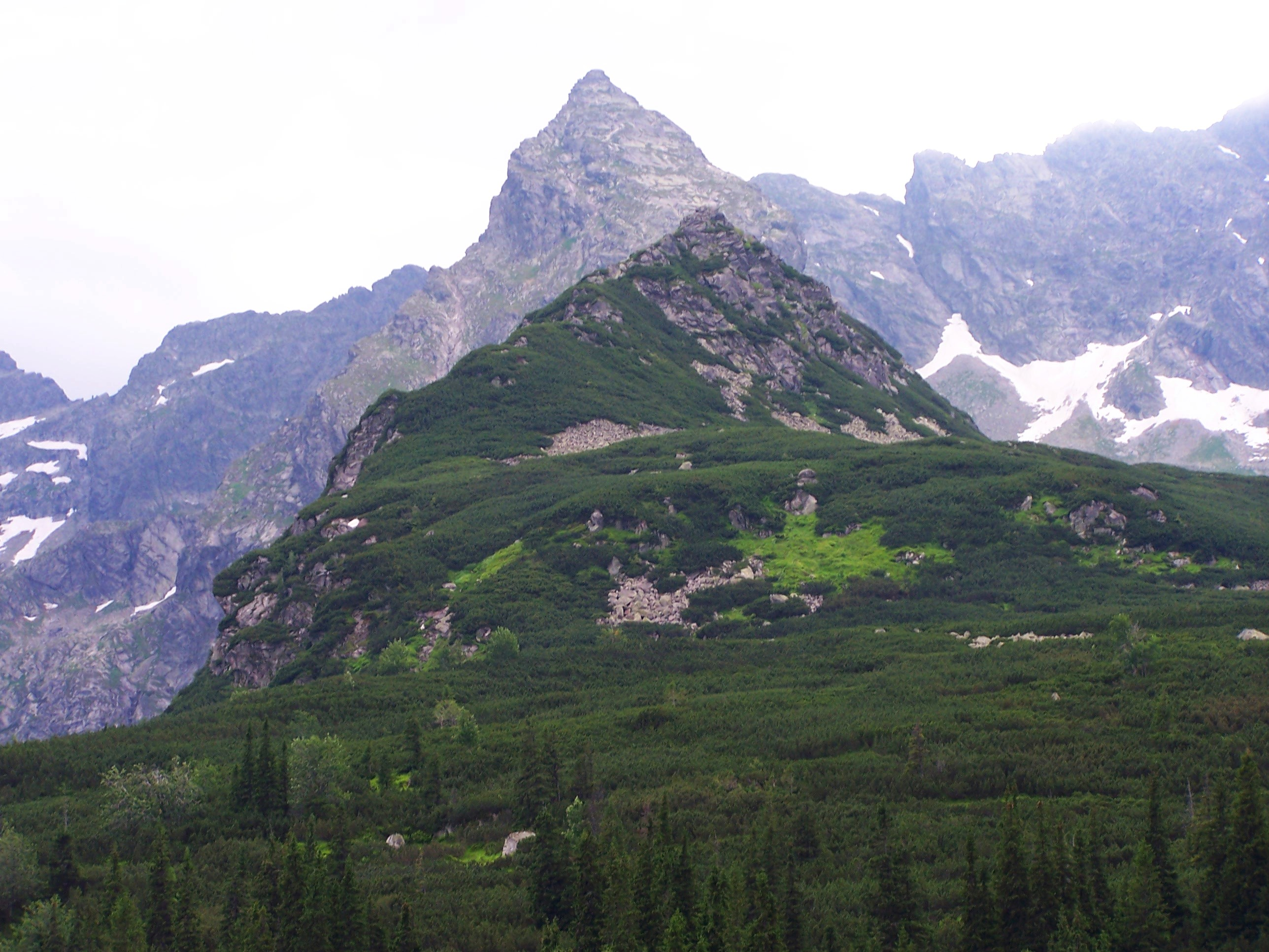 Kościelec (Tatra Mountains)